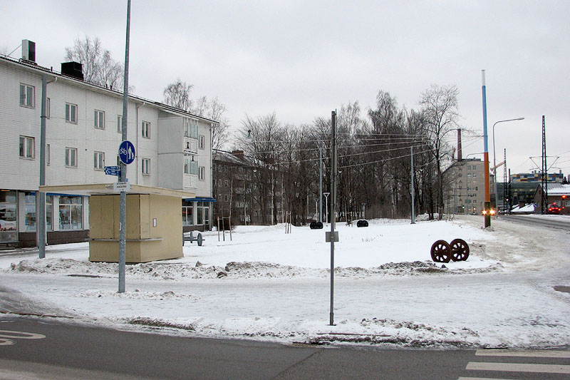 Arabianaukio, Helsinki, Finland